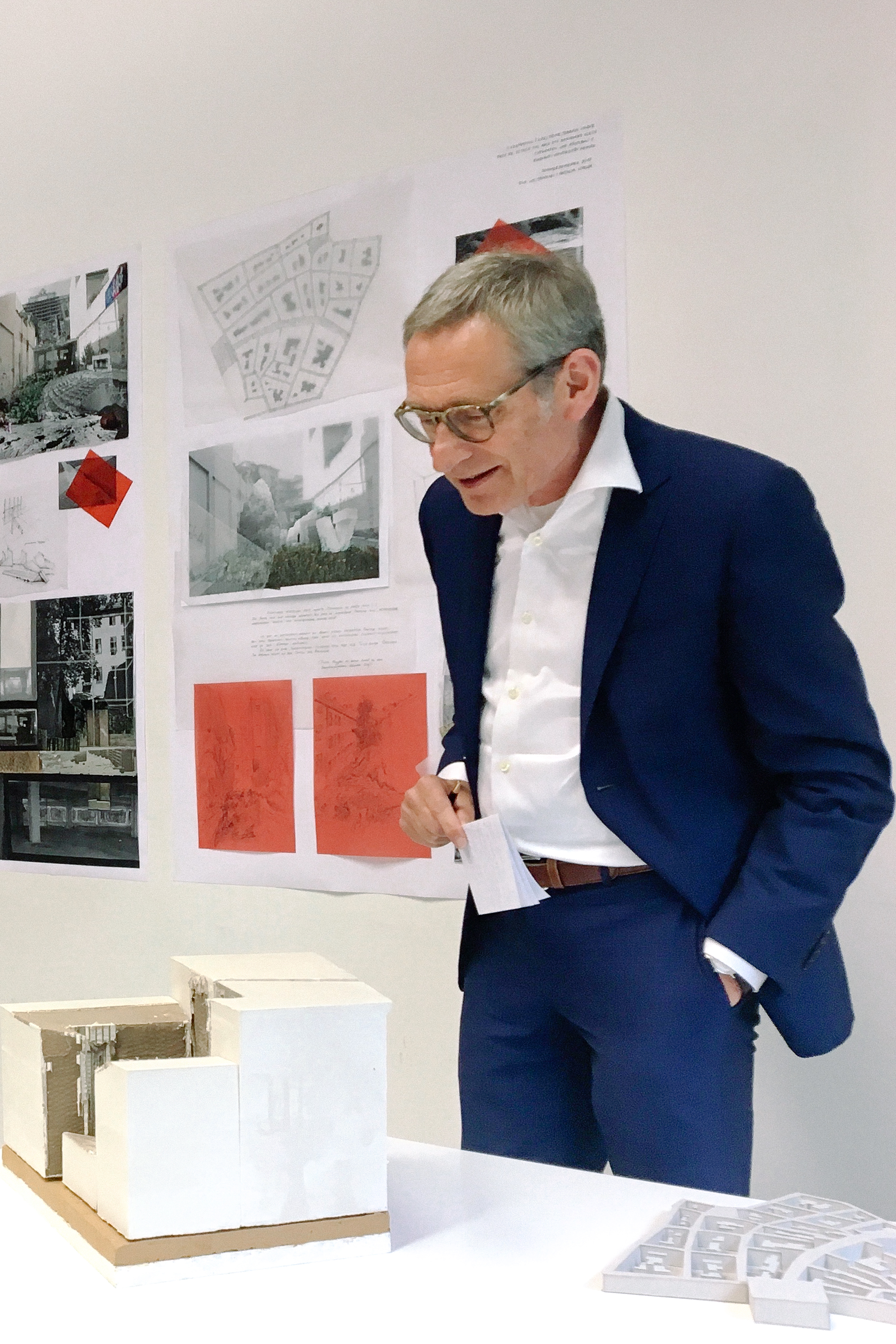 Gespräch in den Räumen der Bauhaus-Universität Weimar